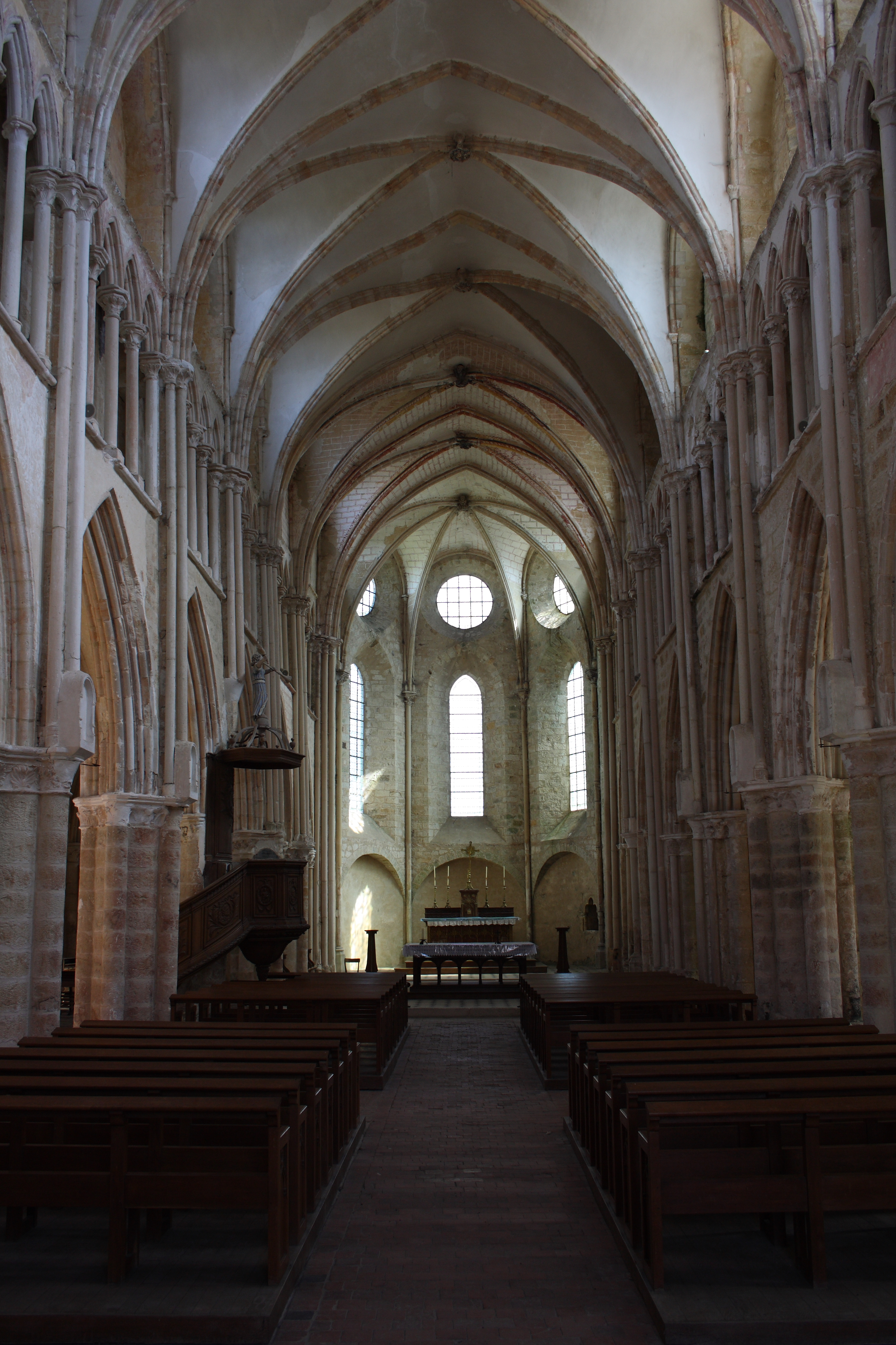 Katholische Pfarrkirche Saint-Eliphe in Rampillon, einer Gemeinde im Département Seine-et-Marne (Île-de-France), Langhaus mit Blick zum Chor